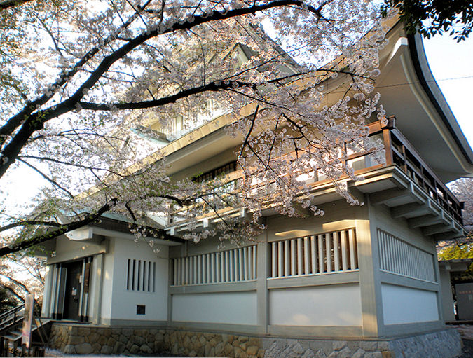 愛知県小牧市の小牧山にある小牧市歴史館（小牧城）の縦パノラマ写真（ソフトウェアで合成）